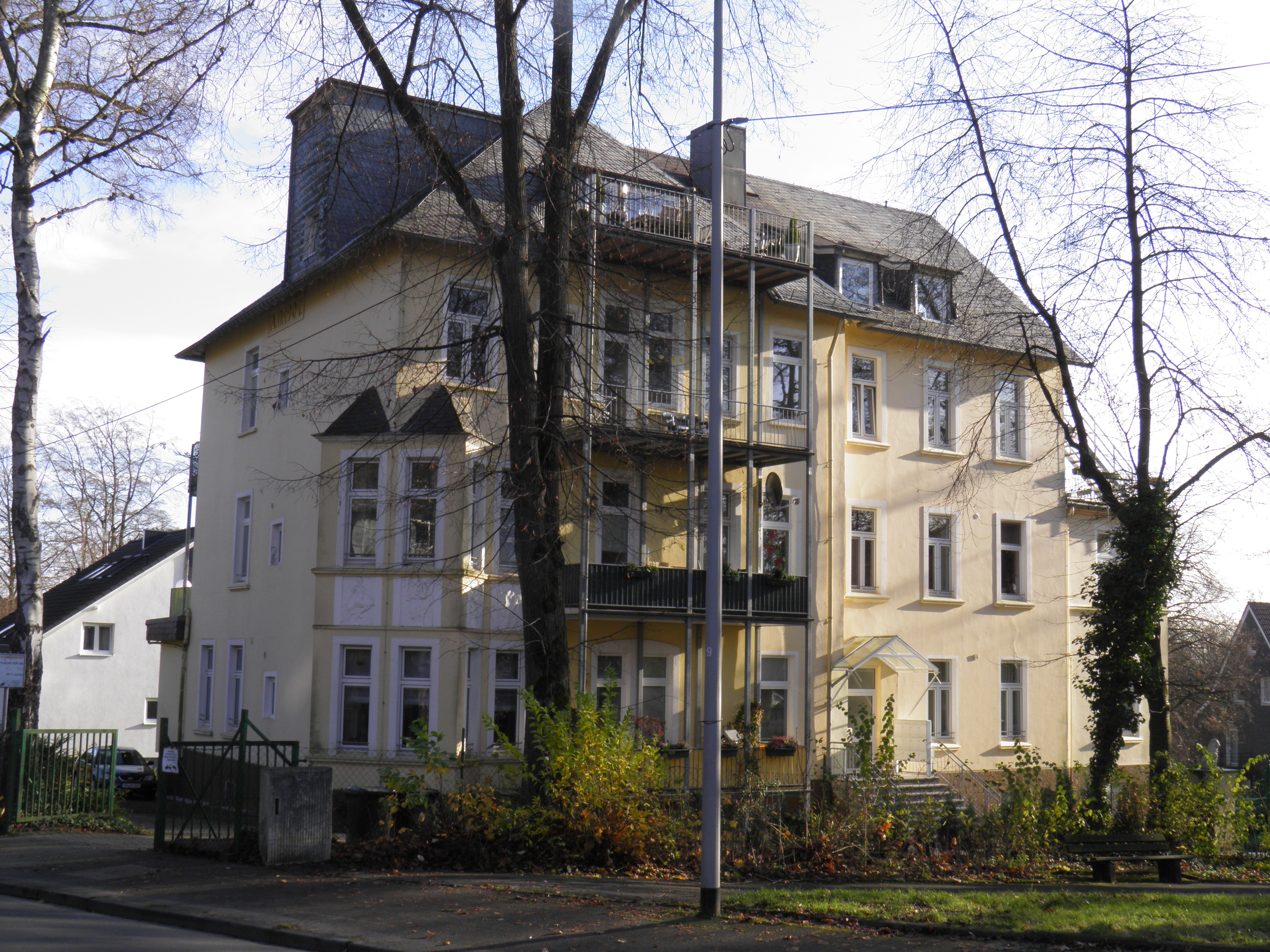 Ehemaliges Lenneper Krankenhaus in der Hackenberger Straße